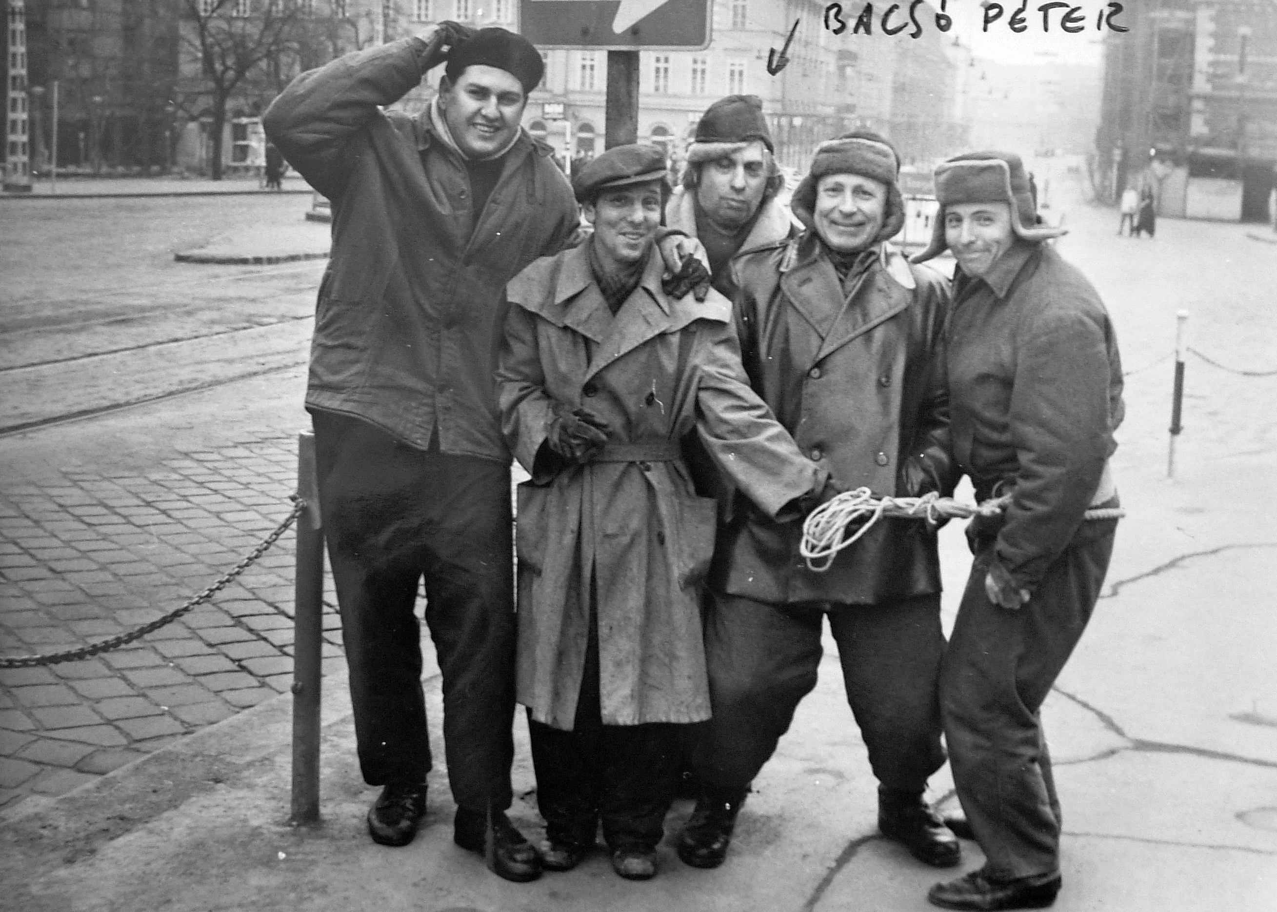 Vámház (Dimitrov) tér és a Vámház (Tolbuhin) körút a Szabadság híd pesti hídfőjétől nézve. Bacsó Péter és a stáb tagjai a Forró vizet a kopaszra c. film forgatásakor. Location: Hungary, Budapest Tags: celebrity, tableau, leather jacket Title: Vámház (Dimitrov) tér és a Vámház (Tolbuhin) körút a Szabadság híd pesti hídfőjétől nézve. Bacsó Péter és a stáb tagjai a Forró vizet a kopaszra c. film forgatásakor.